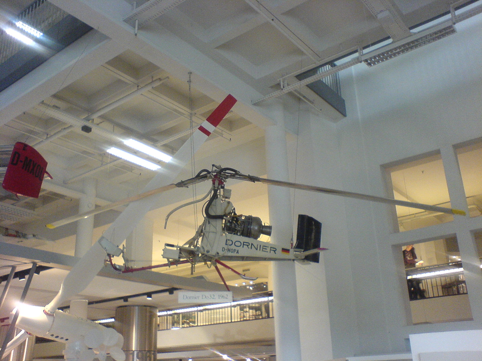 München, Deutsches Museum Dornier Do 32 (Gesamtansicht).